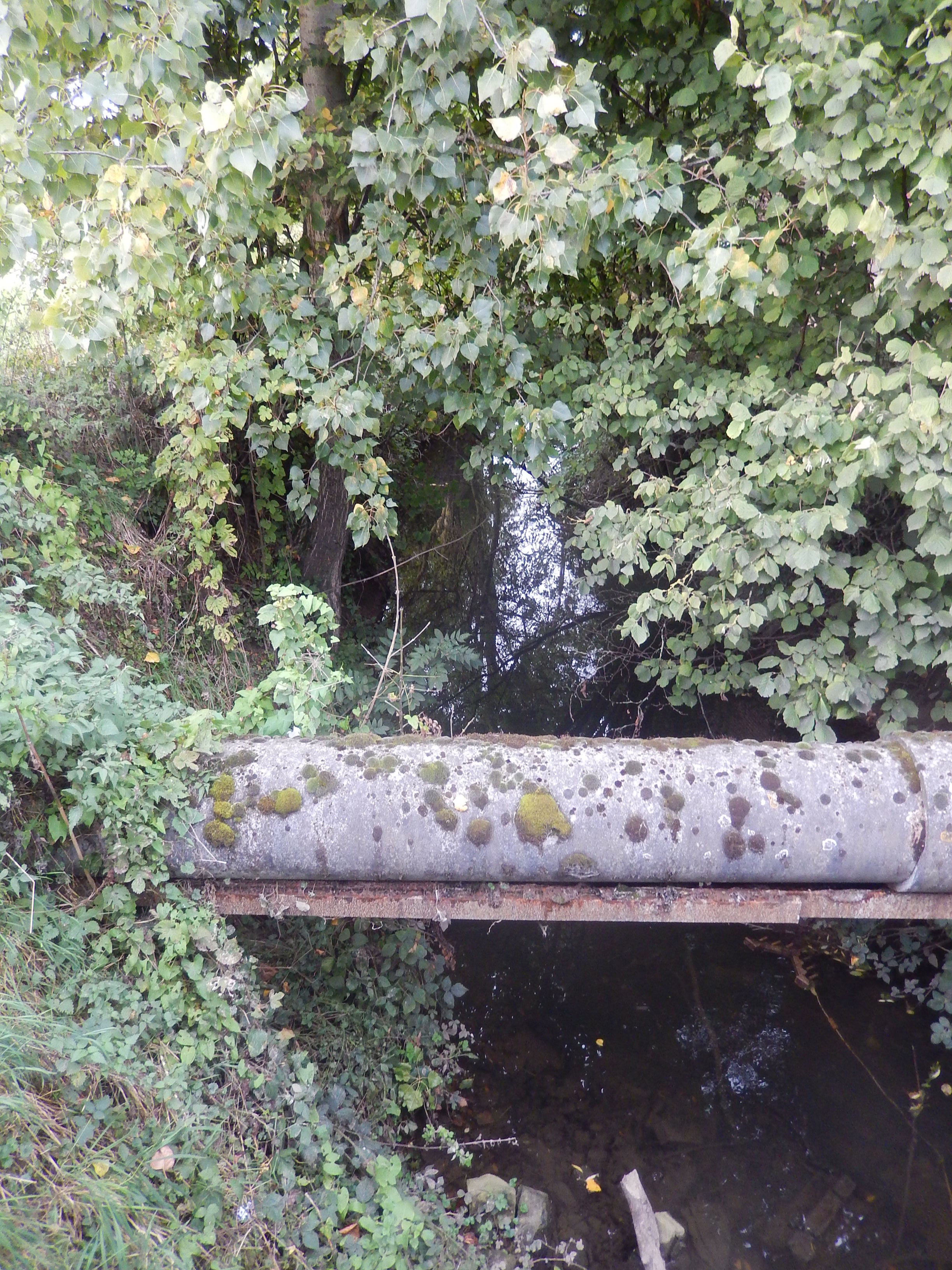 L'Allemagne à Eppeville en octobre 2014